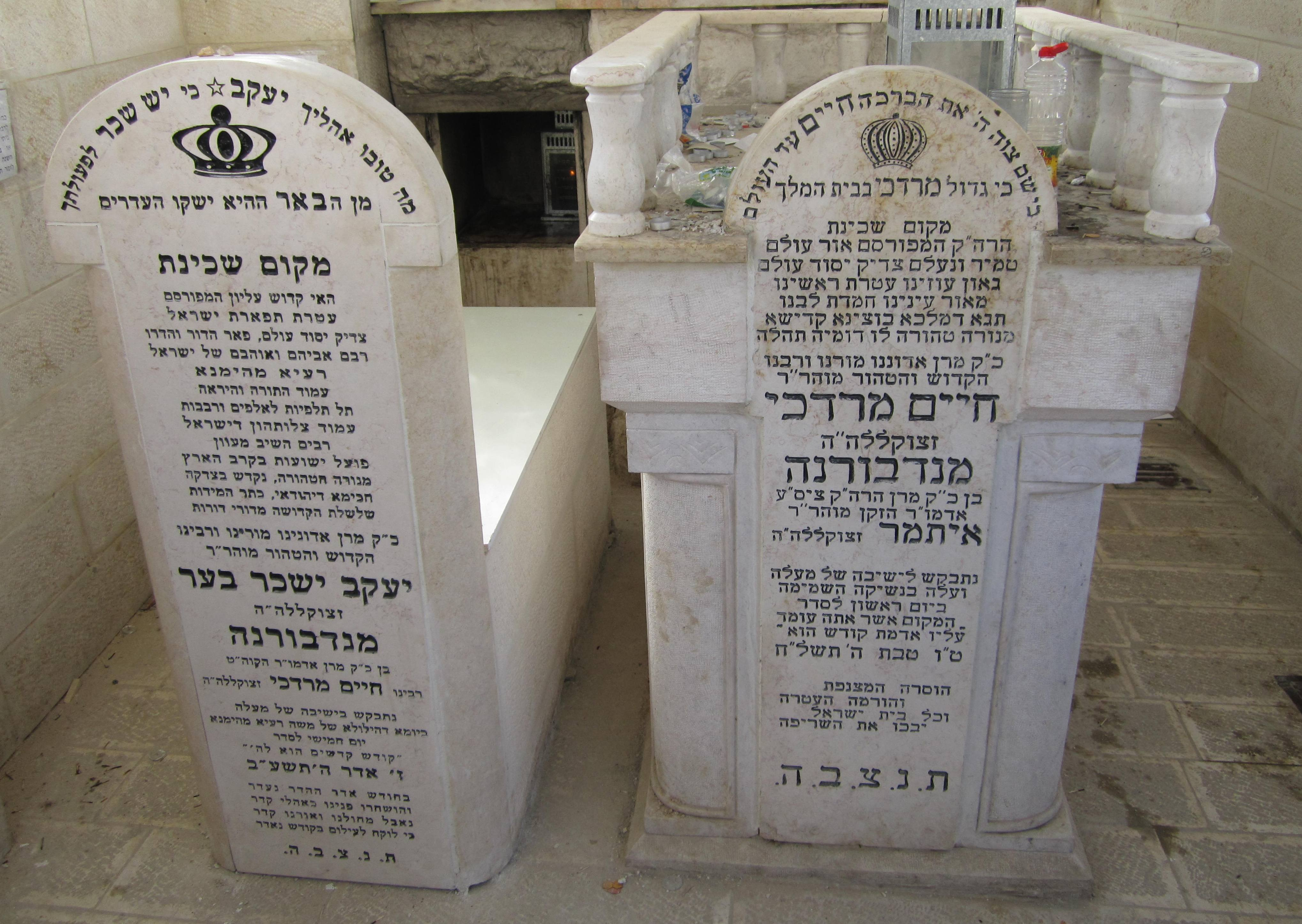 ציוני האדמורי"ם מנדבורנה בהר הזיתים